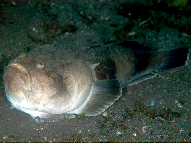 メガネウオ Uranoscopus bicinctus